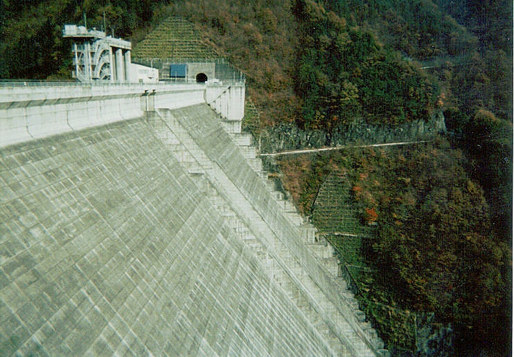 Dam